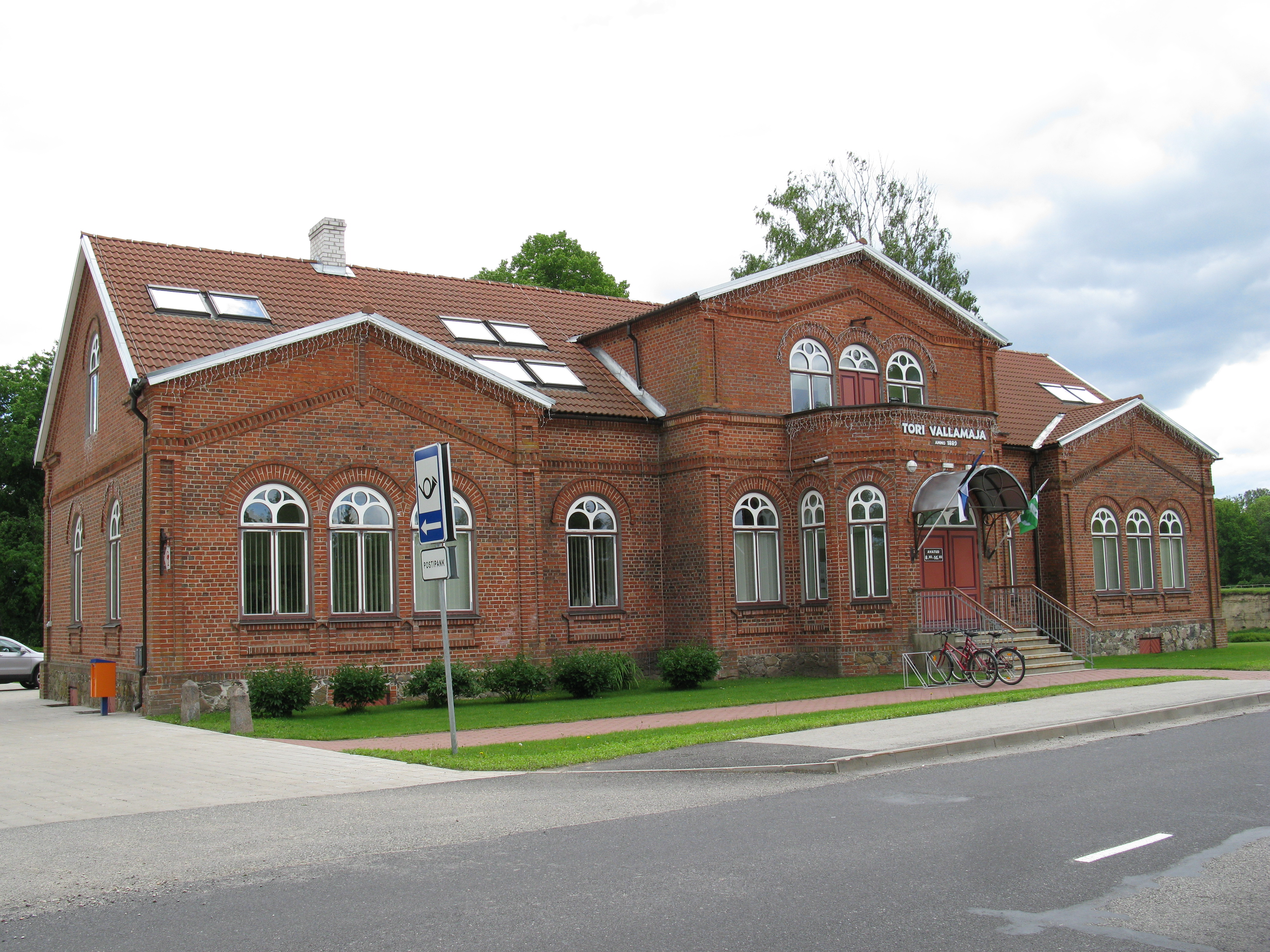 Eesti esinduslikemaid vallamaju, 1889–1890 ehitatud Tori vallamaja